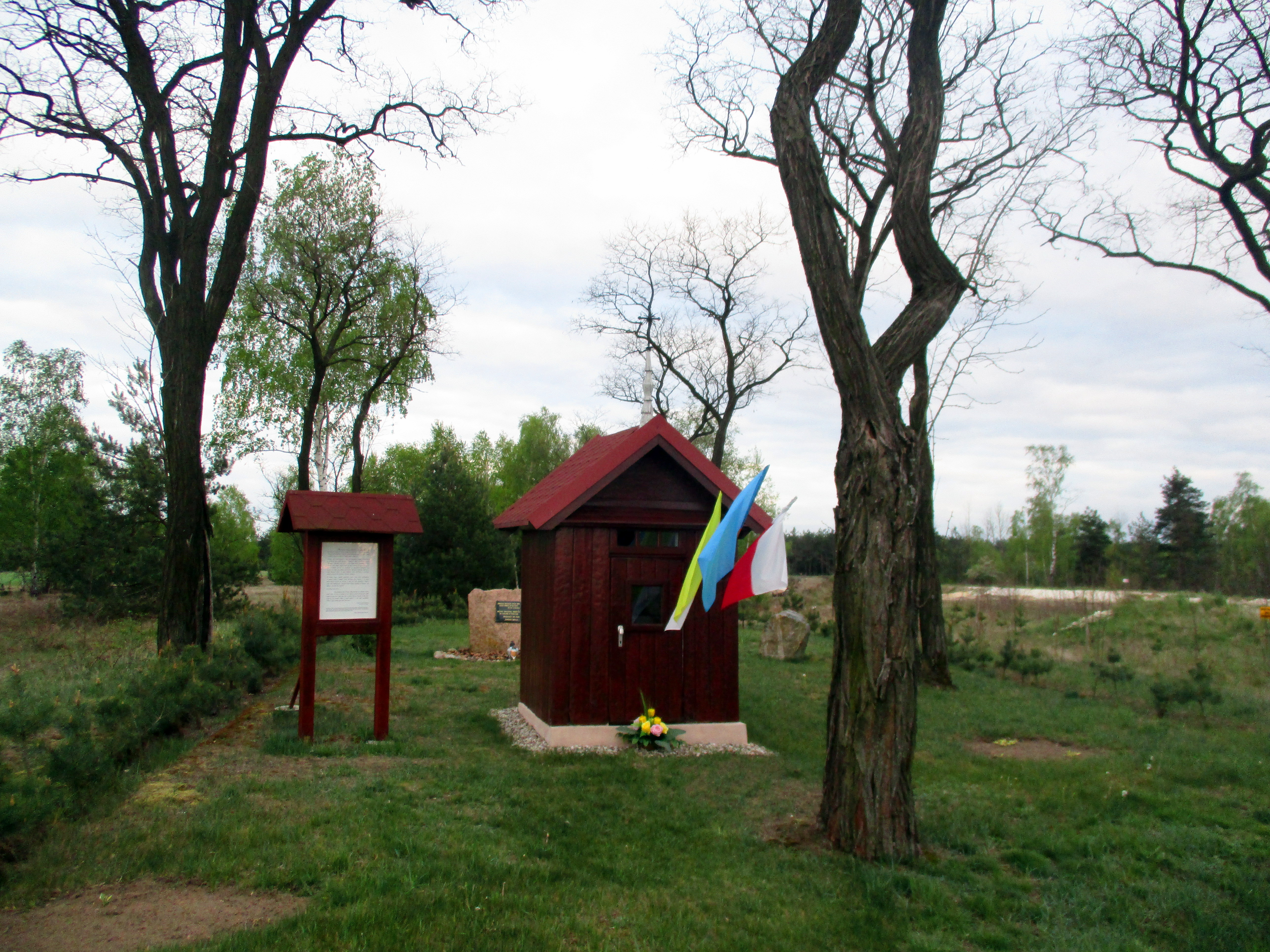 Cmentarz mieszkańców wsi Ruda zmarłych podczas epidemii cholery w 1852 r.